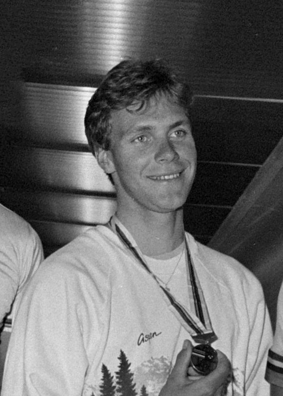 Aankomst Nederlandse Amateurwielerploeg uit Colorado op Schiphol; Arjan Jagt